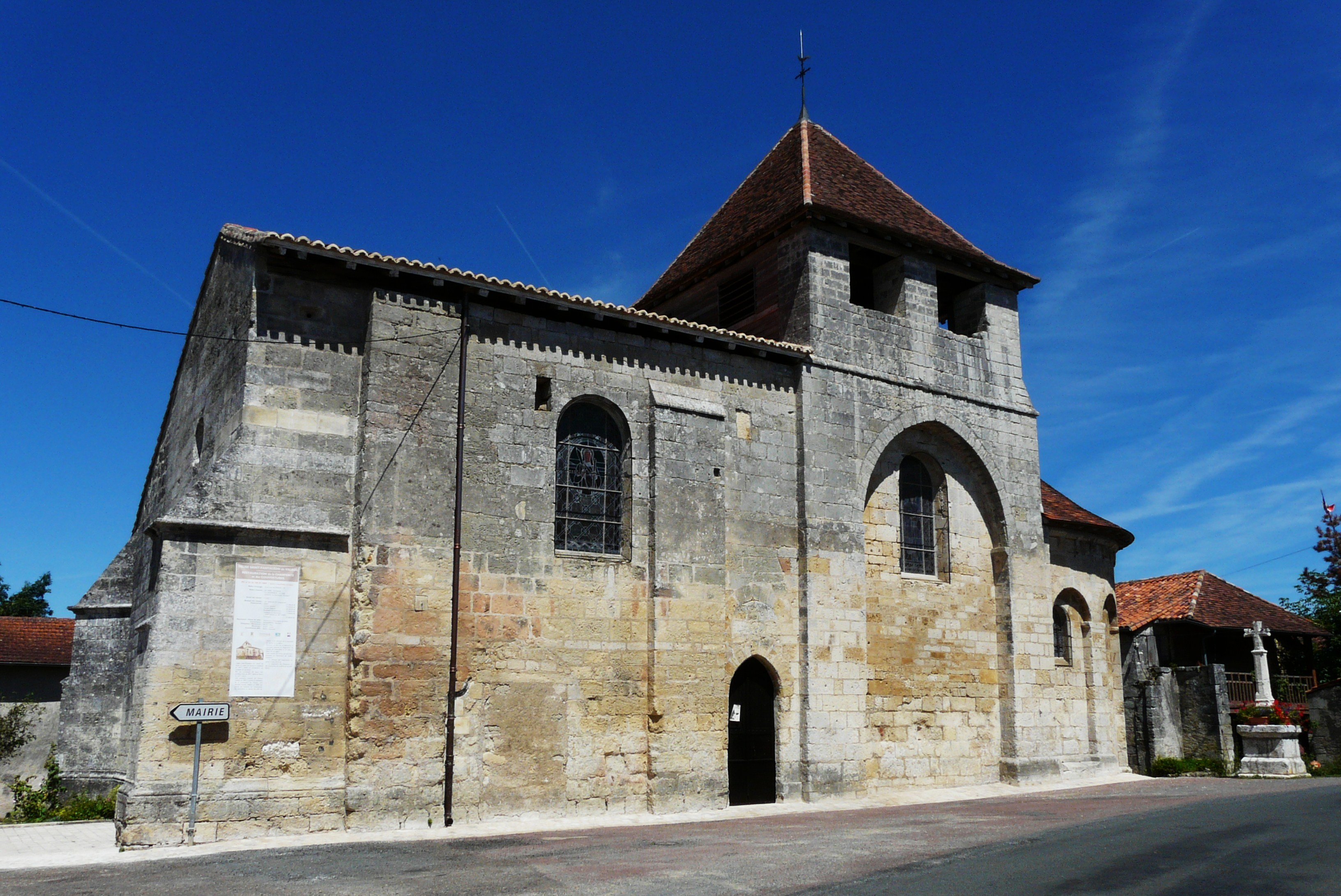 Église Saint-Pantaléon de Valeuil Object location45° 20′ 00.3″ N, 0° 37′ 05.4″ E